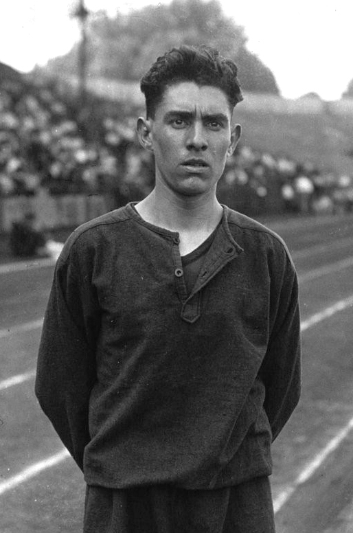 Colombes : championnat de France : Ladoumègue (portrait à 2 m) : [photographie de presse] / Agence Meurisse